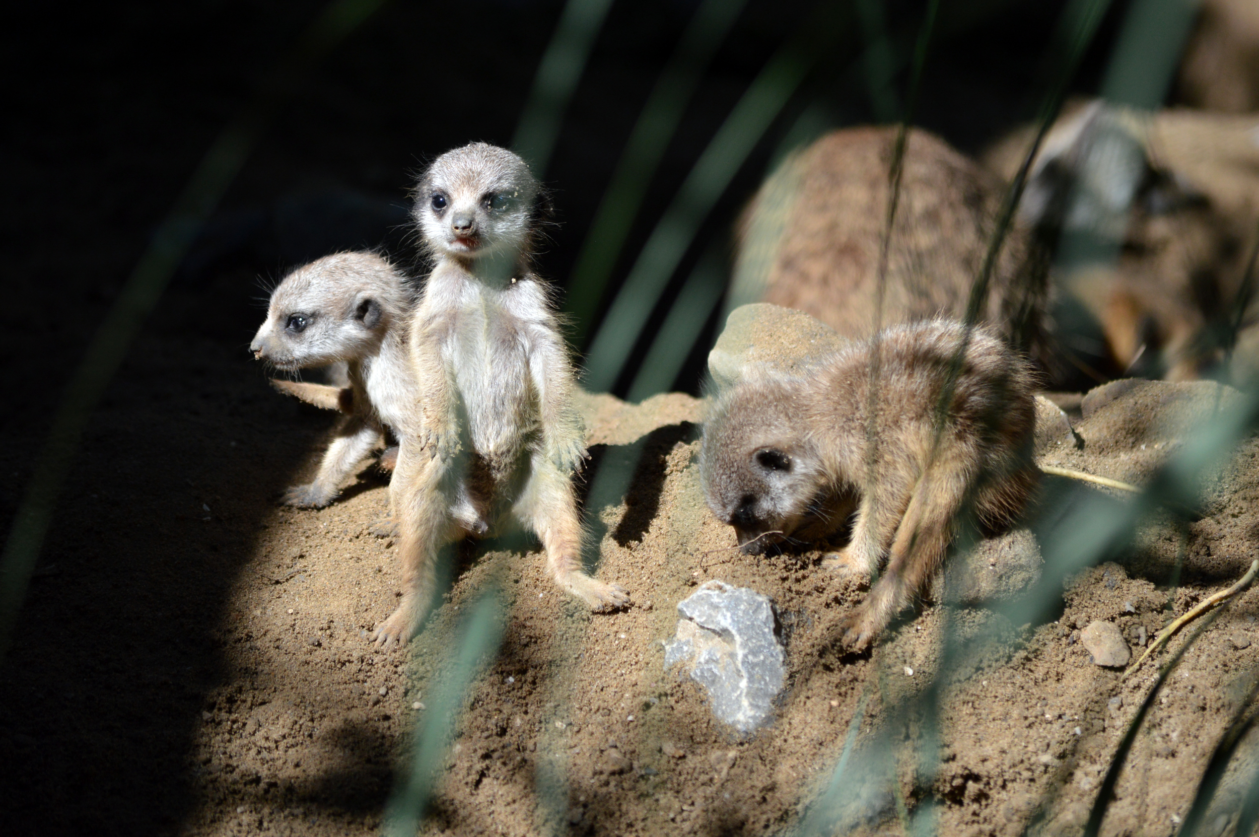 3 des 6 bébés suricate né au zoo d'Amiens en août 2015